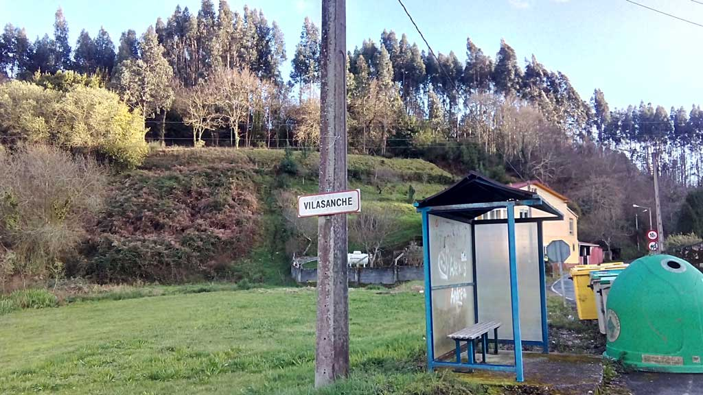 Vilasanche, Ferrol.